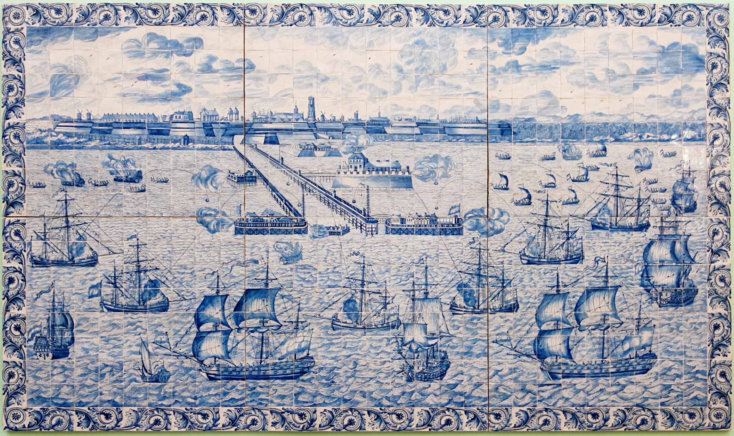 Bombardement de Dunkerque 11 août 1695 par les flottes d'Angleterre et de Hollande au musée des beaux-arts de Dunkerque.